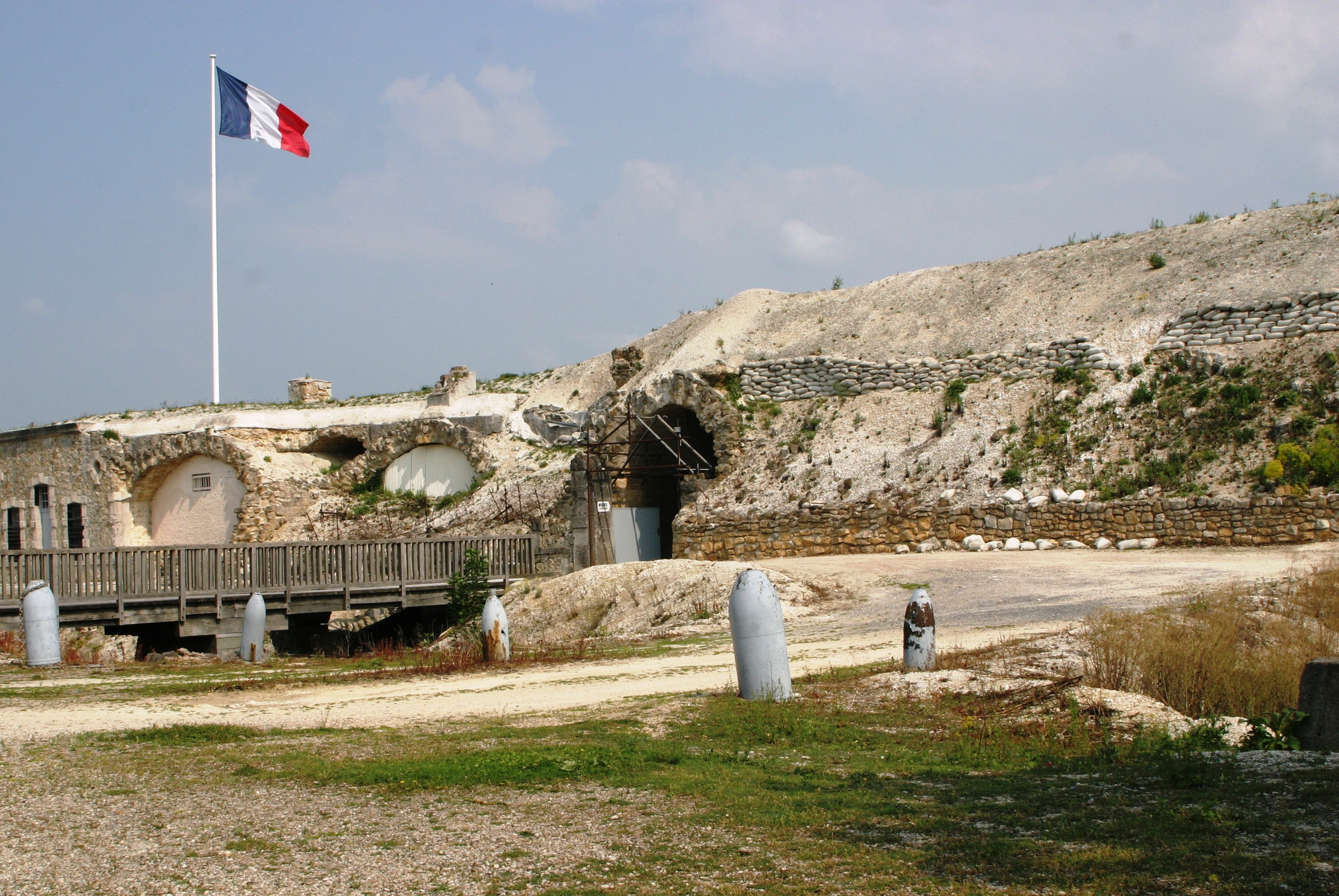 Entréé vum Fort de la Pompelle Mee 2007.